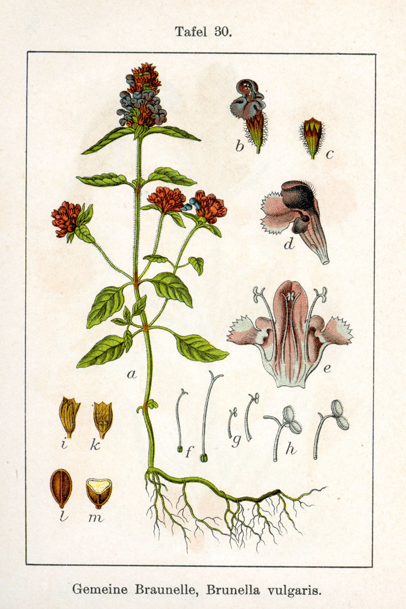 FloraWeb.de: Kleine Braunelle, Prunella vulgaris L. Unresolved name: Brunella vulgaris L. Original Description Gemeine Braunelle, Brunella vulgaris